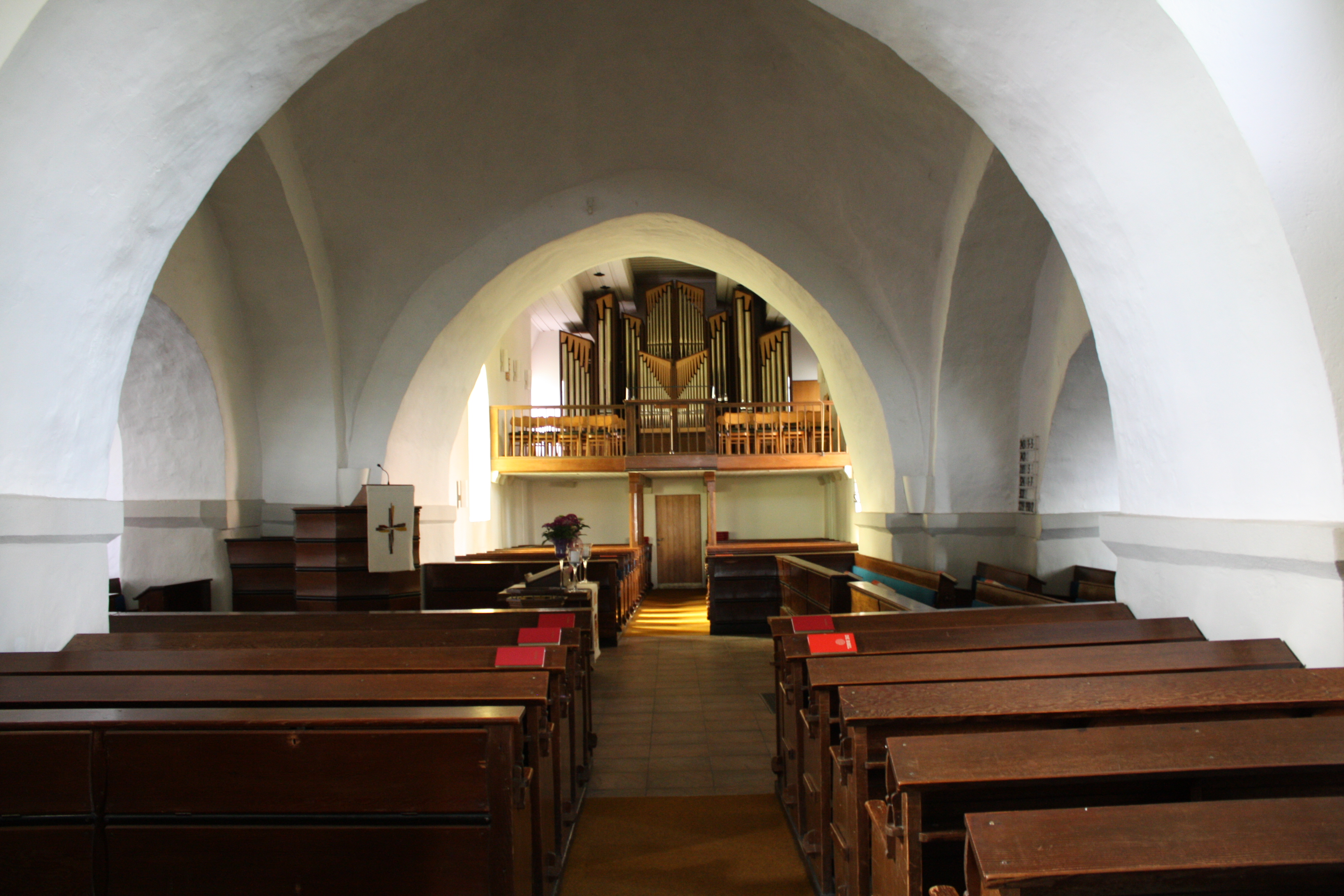 e